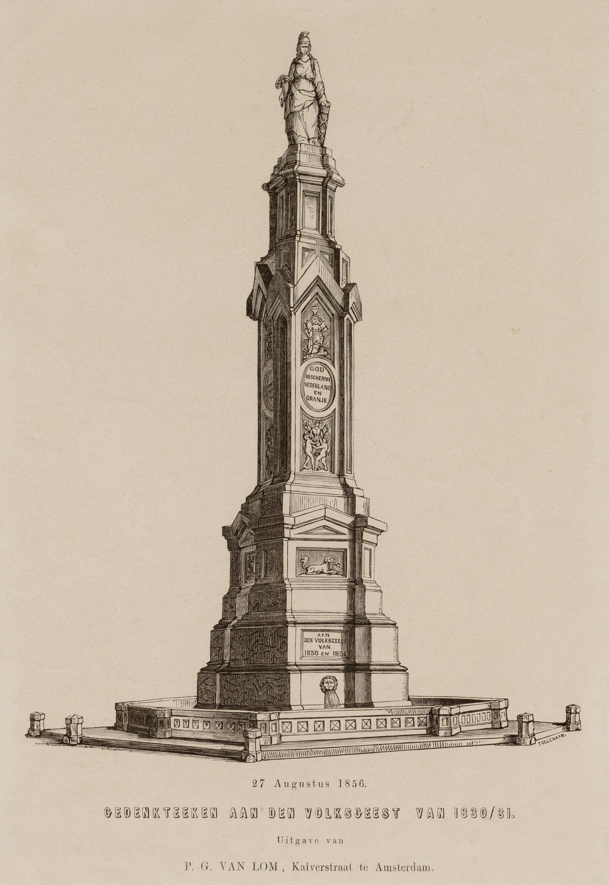 Beschrijving Gedenkteken aan de Volksgeest van 1830/31 Monument voor de Volksgeest, 'Naatje van de Dam', op 27 Augustus 1856 onthuld door Koning Willem III. Techniek: houtsnede. Documenttype prent Vervaardiger Tollenaar Wz., Dirk Wijbrand (1808-1858) Lom, P.G. van Collectie Collectie Stadsarchief Amsterdam: tekeningen en prenten Datering 27 augustus 1856 Geografische naam Dam Inventarissen Afbeeldingsbestand 010097004844